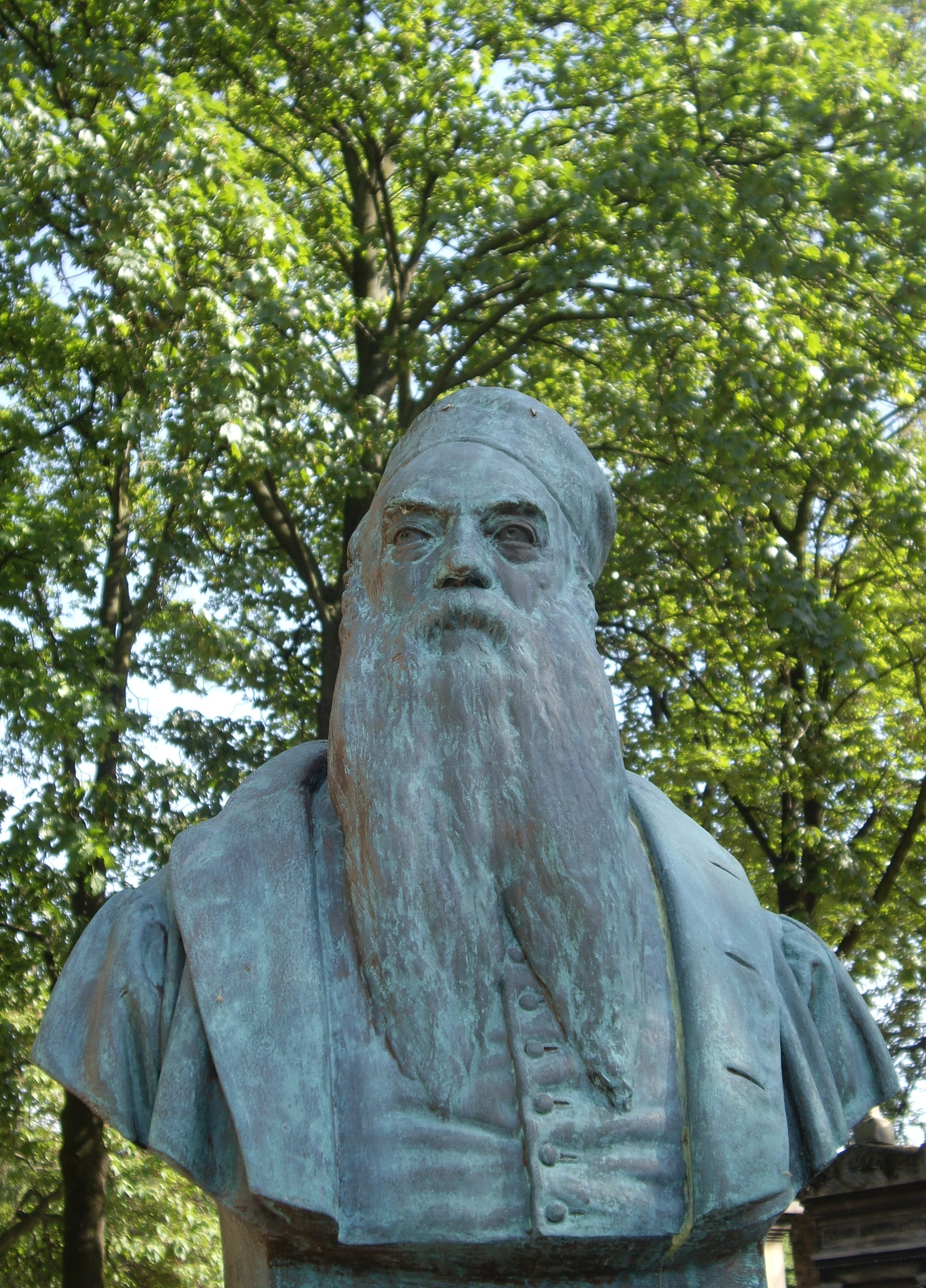 Tombe de François Rude, cimetière du Montparnasse (division 1). Buste (1856) par Paul Cabet (1815-1876).